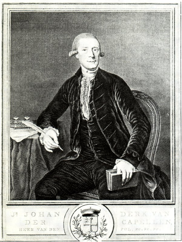 Johan Derk van der Capellen tot de Poll Atlas Van Stolk Foundation, Rotterdam